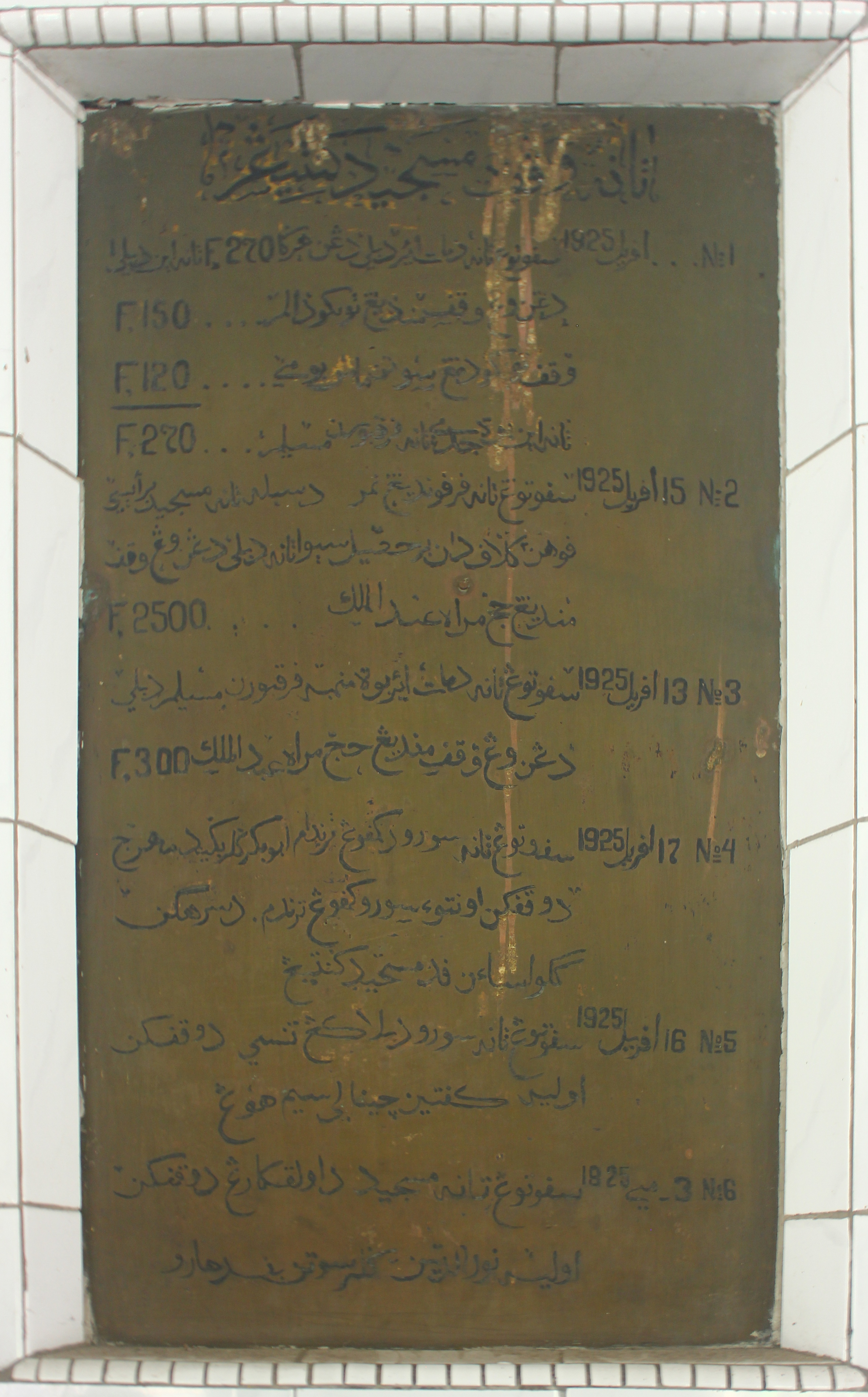 Prasasti Tanda Wakaf Masjid Raya Ganting